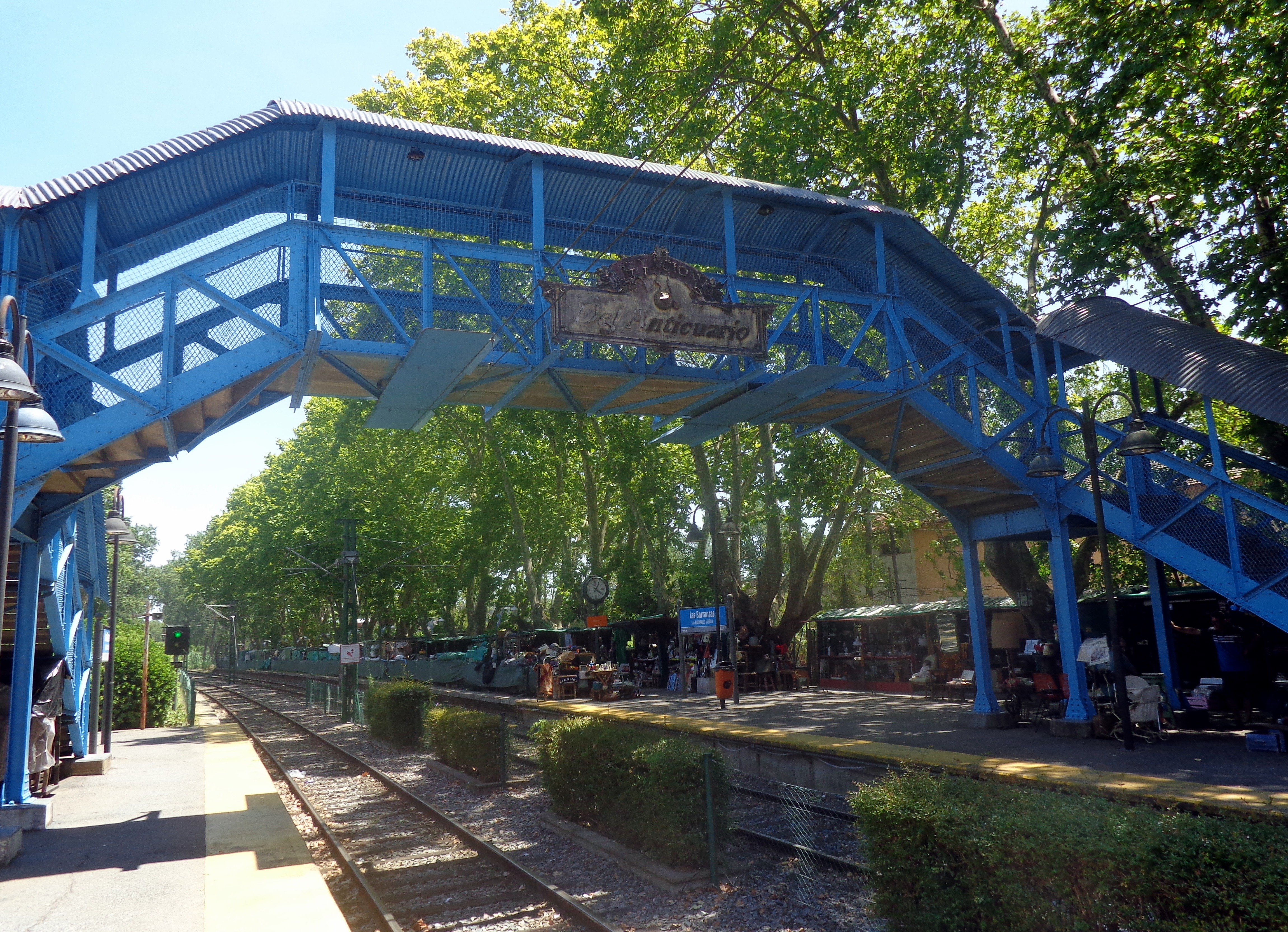 Puente peatonal en la estación de tren Las Barrancas, del Tren de La costa. Acassuso, partido de San Isidro, Provincia de Buenos Aires, Argentina.